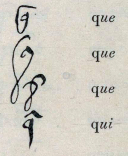 Page du Manuel de paléographie latine et française.